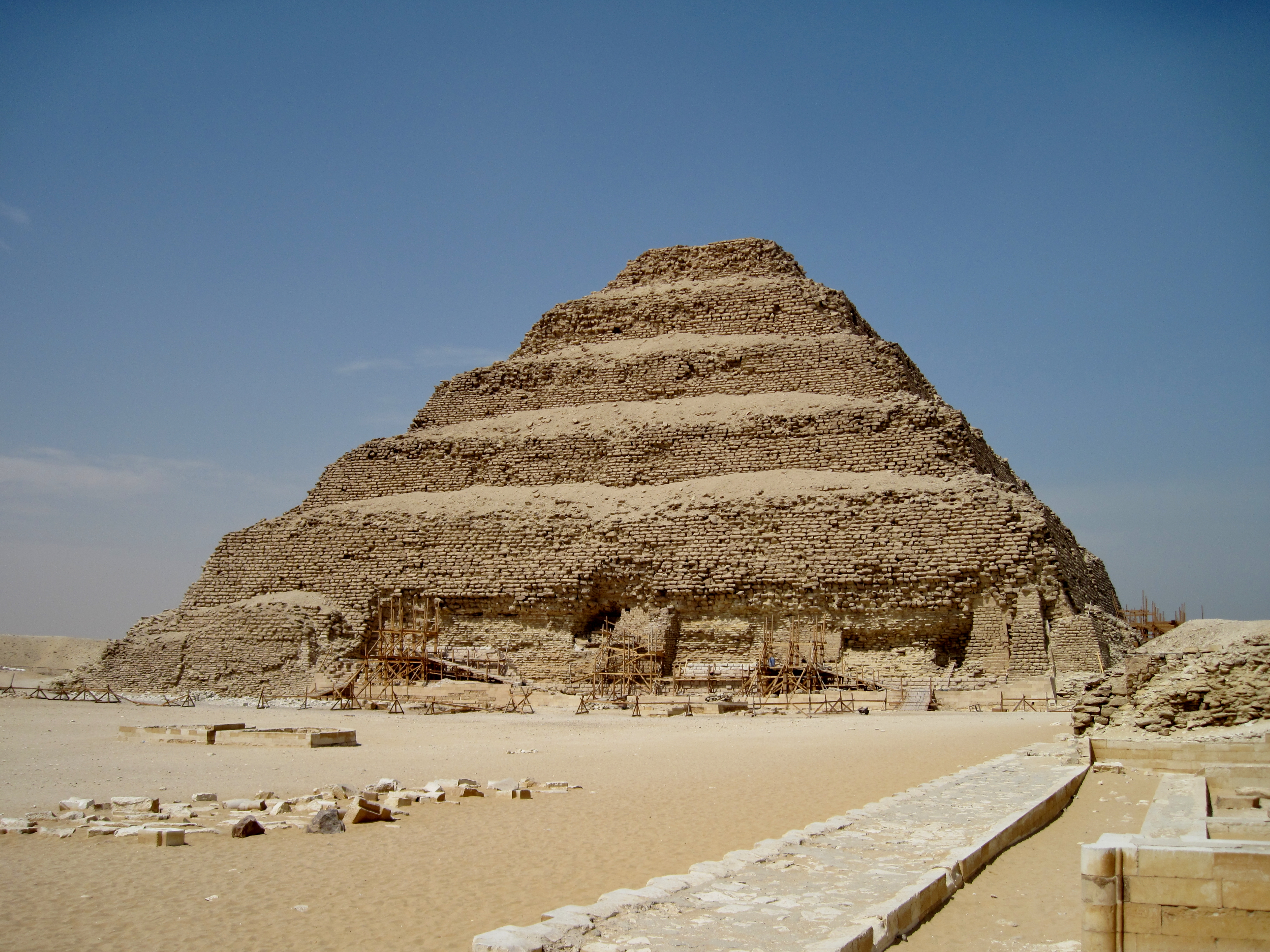 Stufenpyramide des Pharao Djoser aus der 3. Dynastie des Alten Reiches in Ägypten (um 2670 v. Chr.)